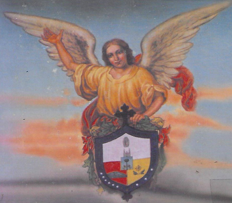 Escudo Capilla de Guaadalupe, Jalisco